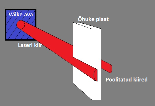 Youngi katse originaalkuju.